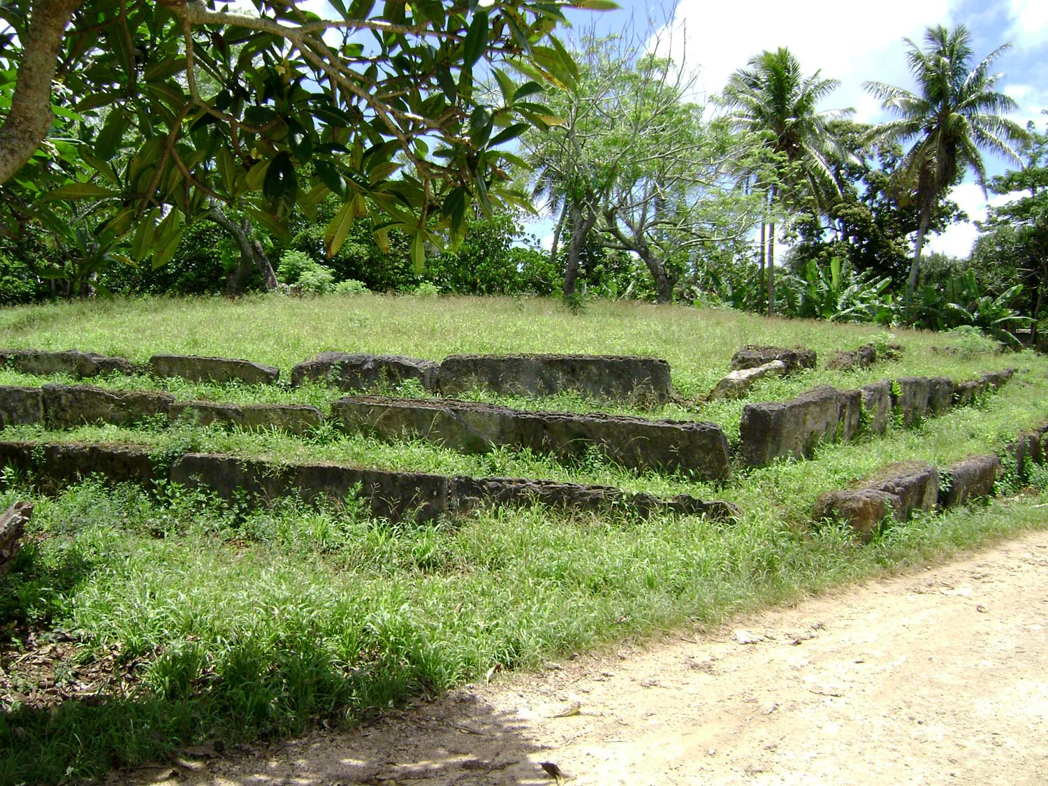 Langi Maluʻatonga; ancient royal burial mound in Lapaha, Tonga